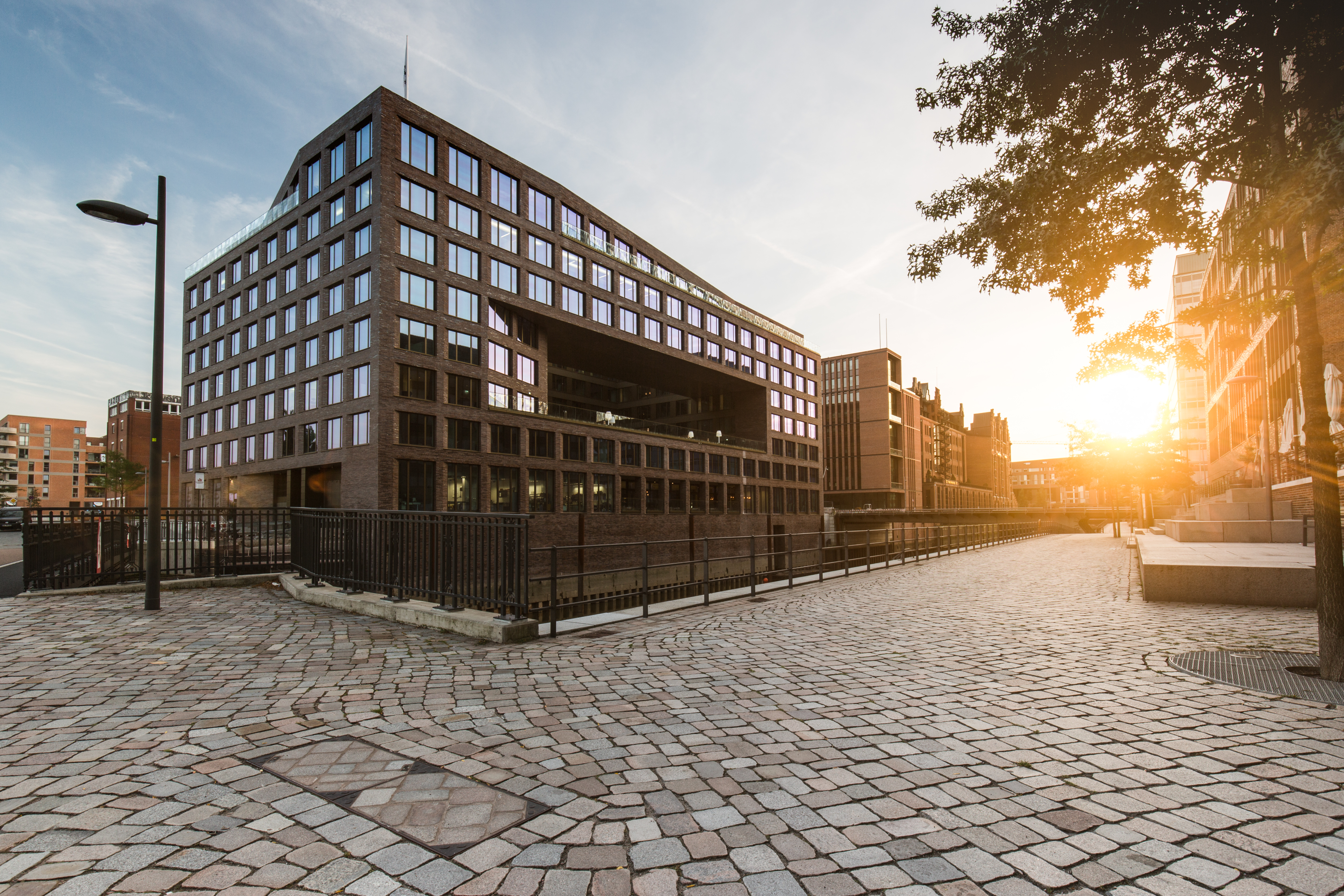 Unternehmenssitz der Marquard & Bahls AG Hamburg in der Koreastraße 7.